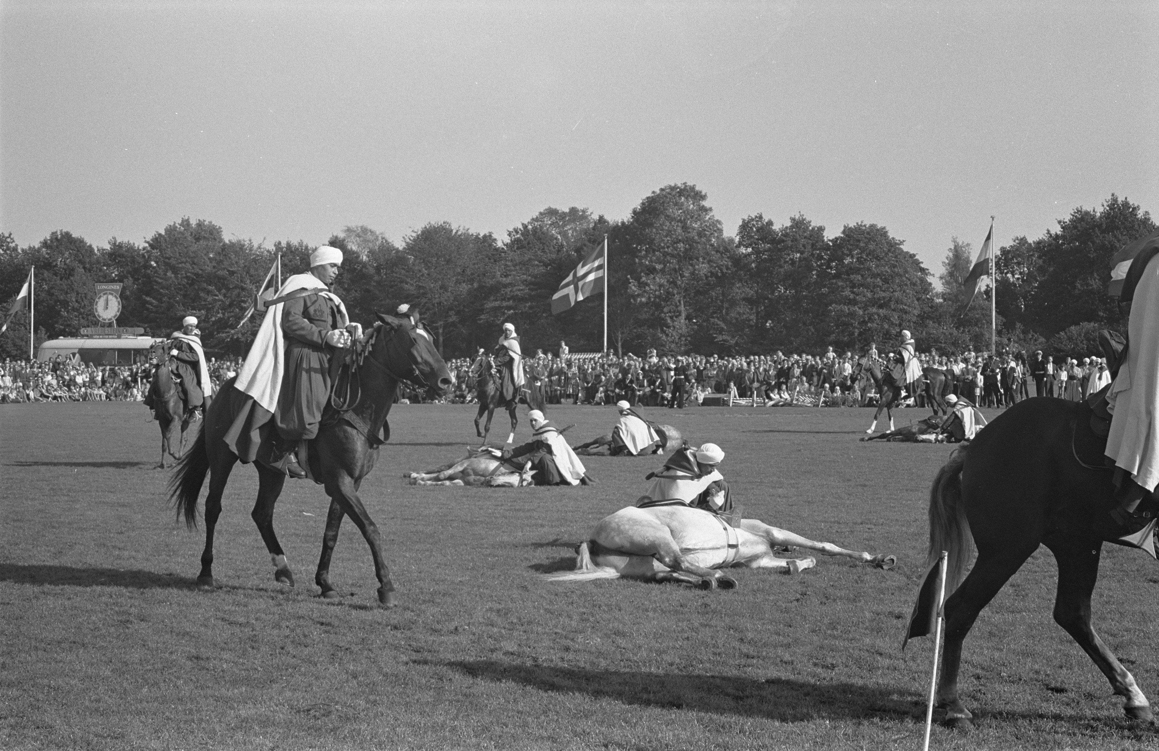 Collectie / Archief : Fotocollectie Anefo Reportage / Serie : [ onbekend ] Beschrijving : Algerijnse "Spahis" in Groninger Sportpark Datum : 28 augustus 1961 Locatie : Algerije Trefwoorden : sportparken Fotograaf : Rossem, Wim van / Anefo Auteursrechthebbende : Nationaal Archief Materiaalsoort : Negatief (zwart/wit) Nummer archiefinventaris : bekijk toegang 2.24.01.05 Bestanddeelnummer : 912-8740